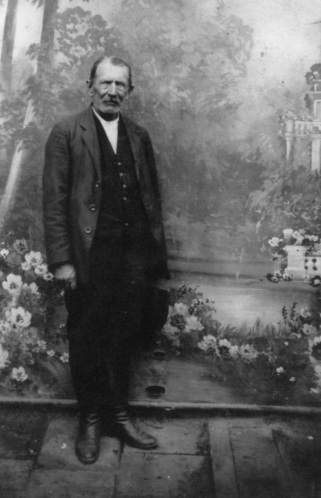 Jan Zaucha ojciec Stanisława